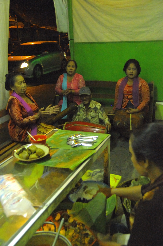 Nasi Liwet Wongso Lemu, Solo, Jawa Tengah